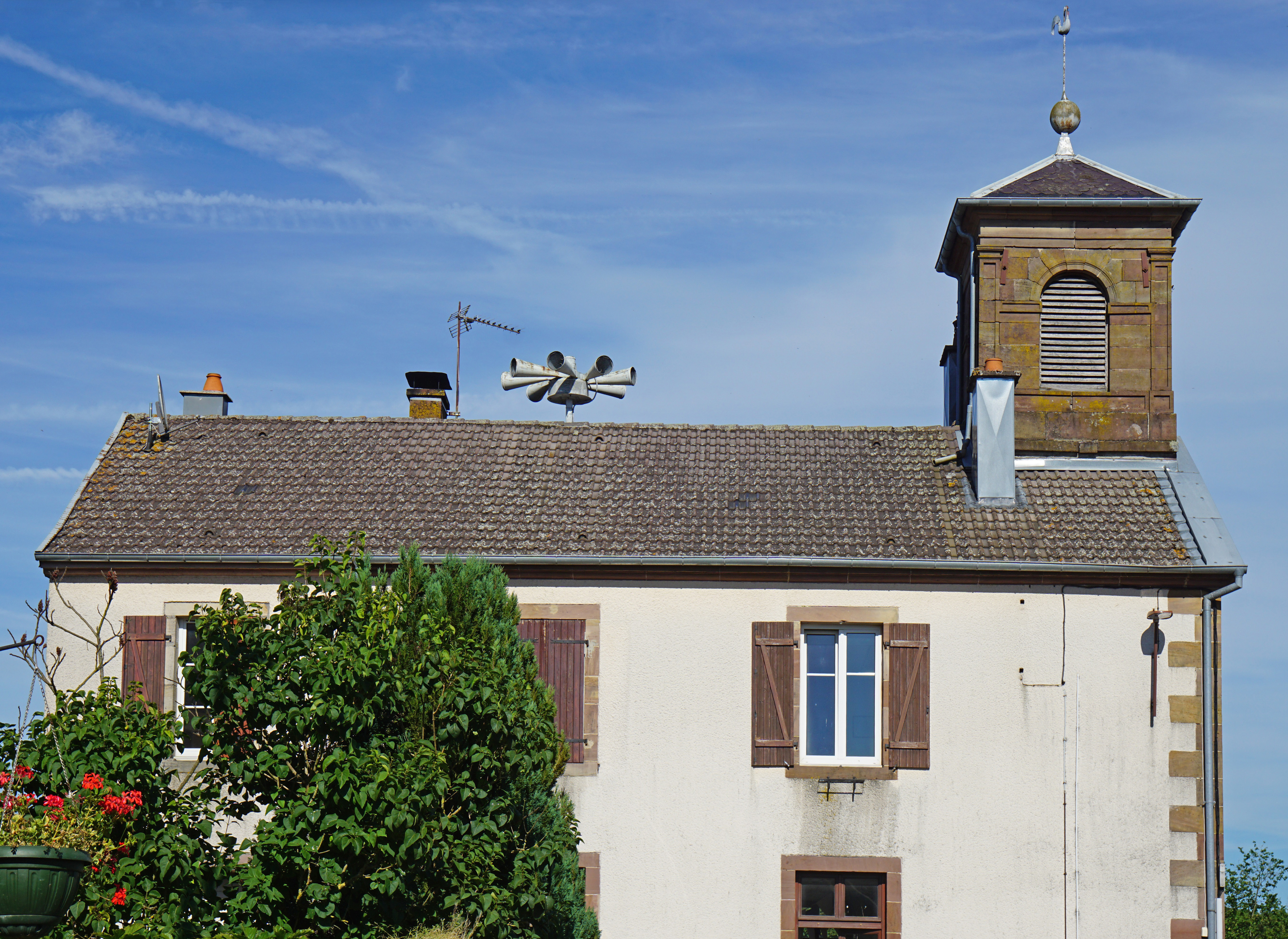 La mairie de Ormoiche.